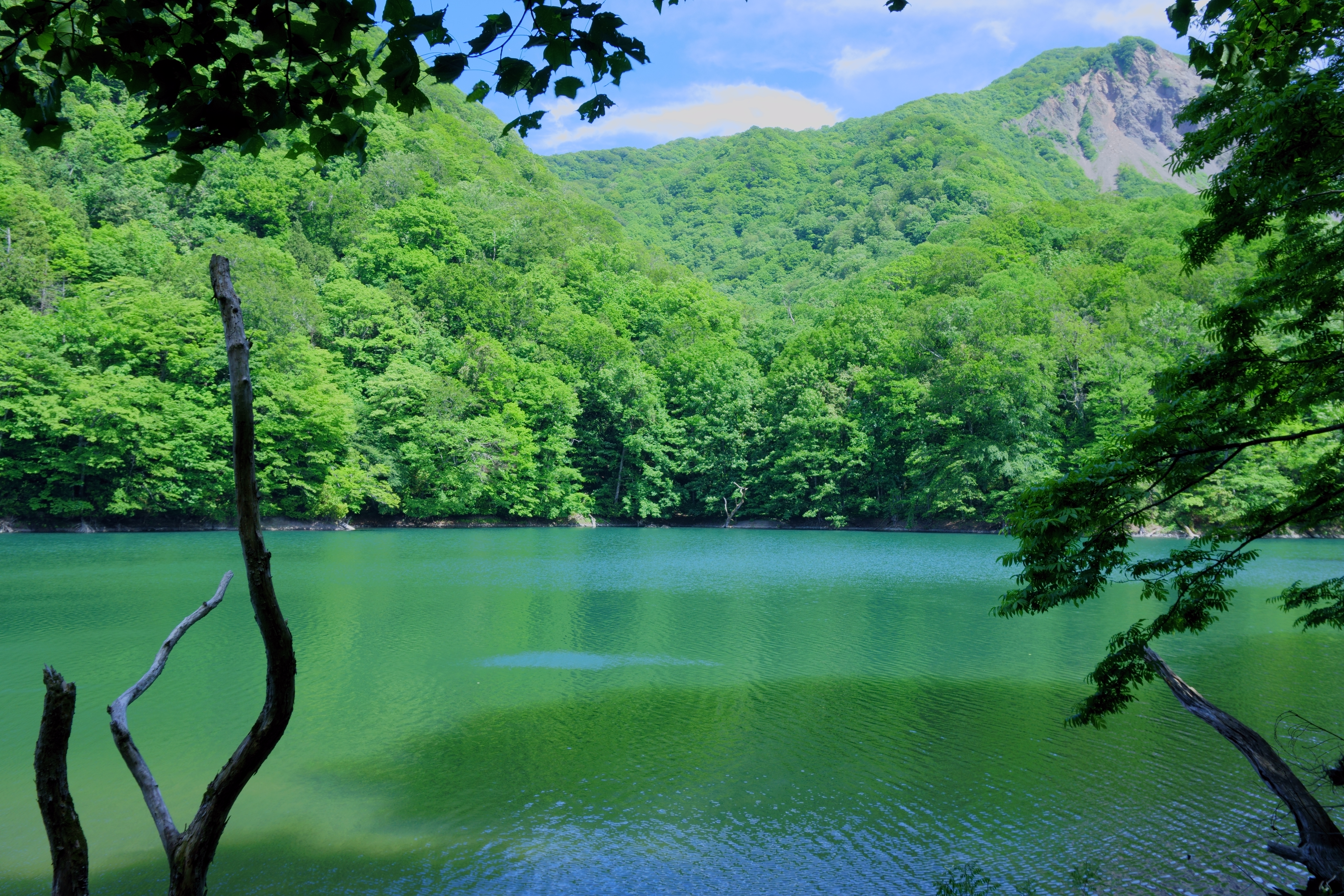 青森県西津軽郡深浦町、十二湖にある湖群の中で2番目の面積をもつ鶏頭場の池。十二湖は白神山地の一角にあるが、世界自然遺産の核心地域外にあり、津軽国定公園内の自然景勝地である。画面右上には崩山を望む。